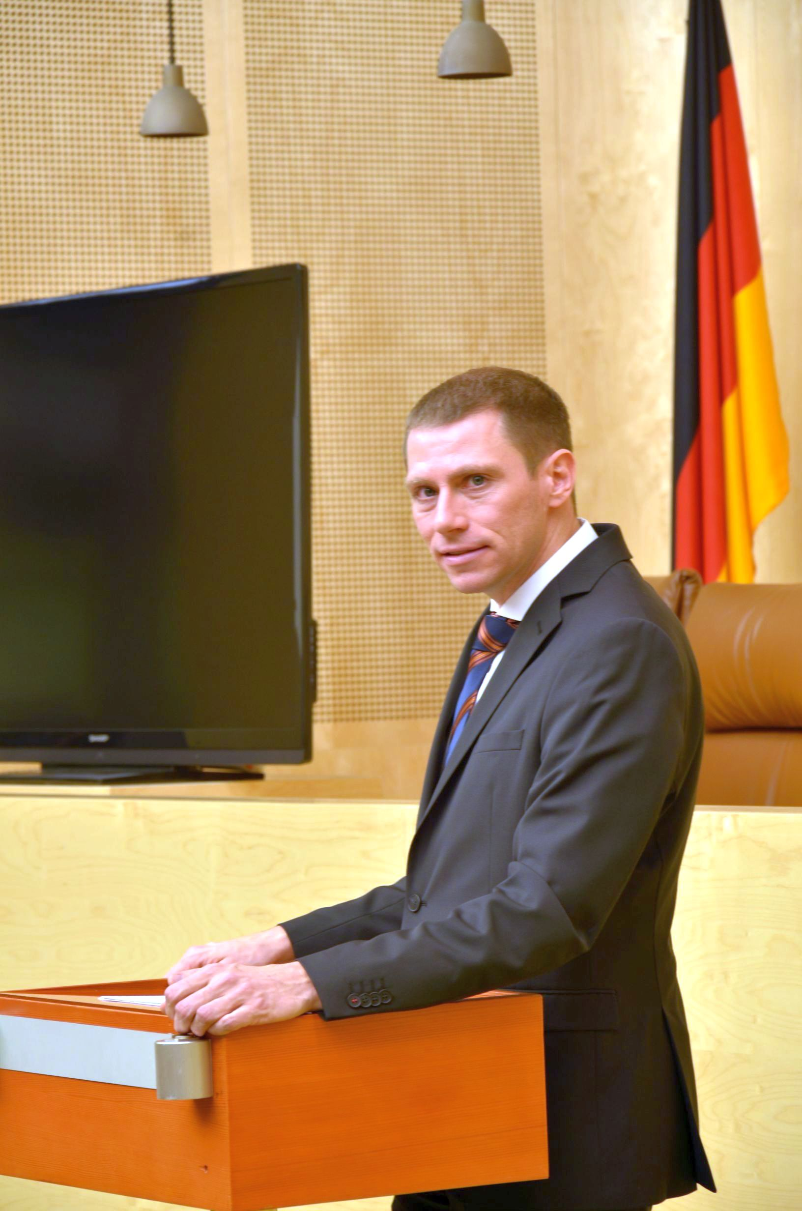 Exkursion von WikiCon-Teilnehmern zum Bundesverfassungsgericht, Dienstsitz Waldstadt. Bernd Odörfer, Pressesprecher des BVerfG und Richter am Oberlandesgericht Stuttgart, gibt Auskunft auf Fragen der Besuchergruppe.